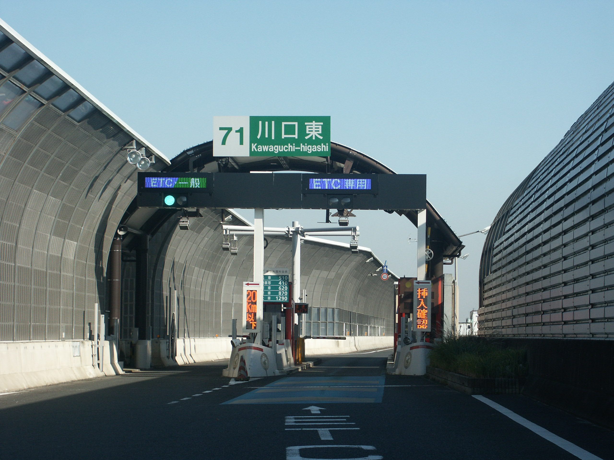 東京外環自動車道川口東IC料金所